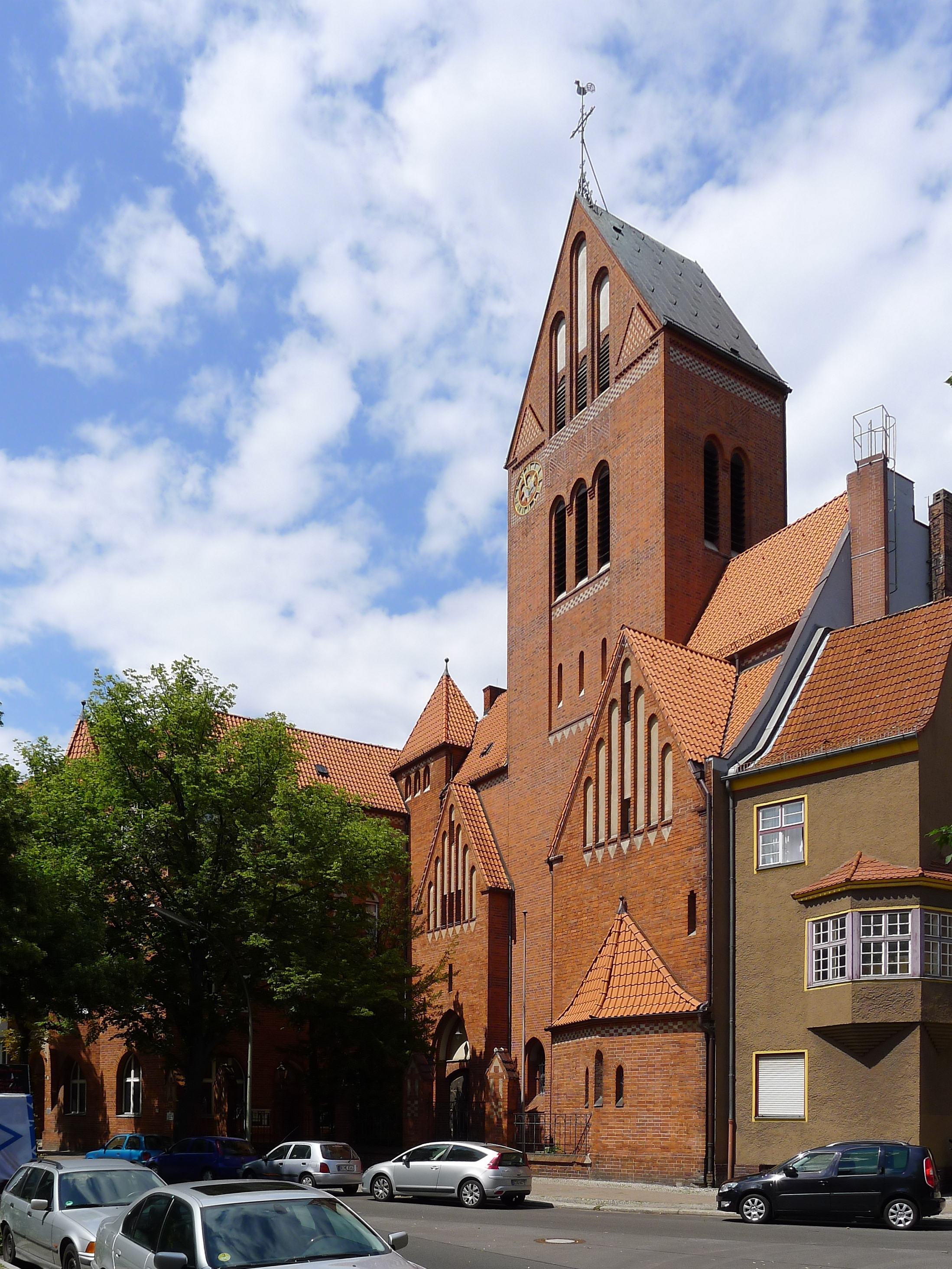 Straßenfront der St. Marien-Kirche, gebaut nach Plänen des Architekten August Kaufhold